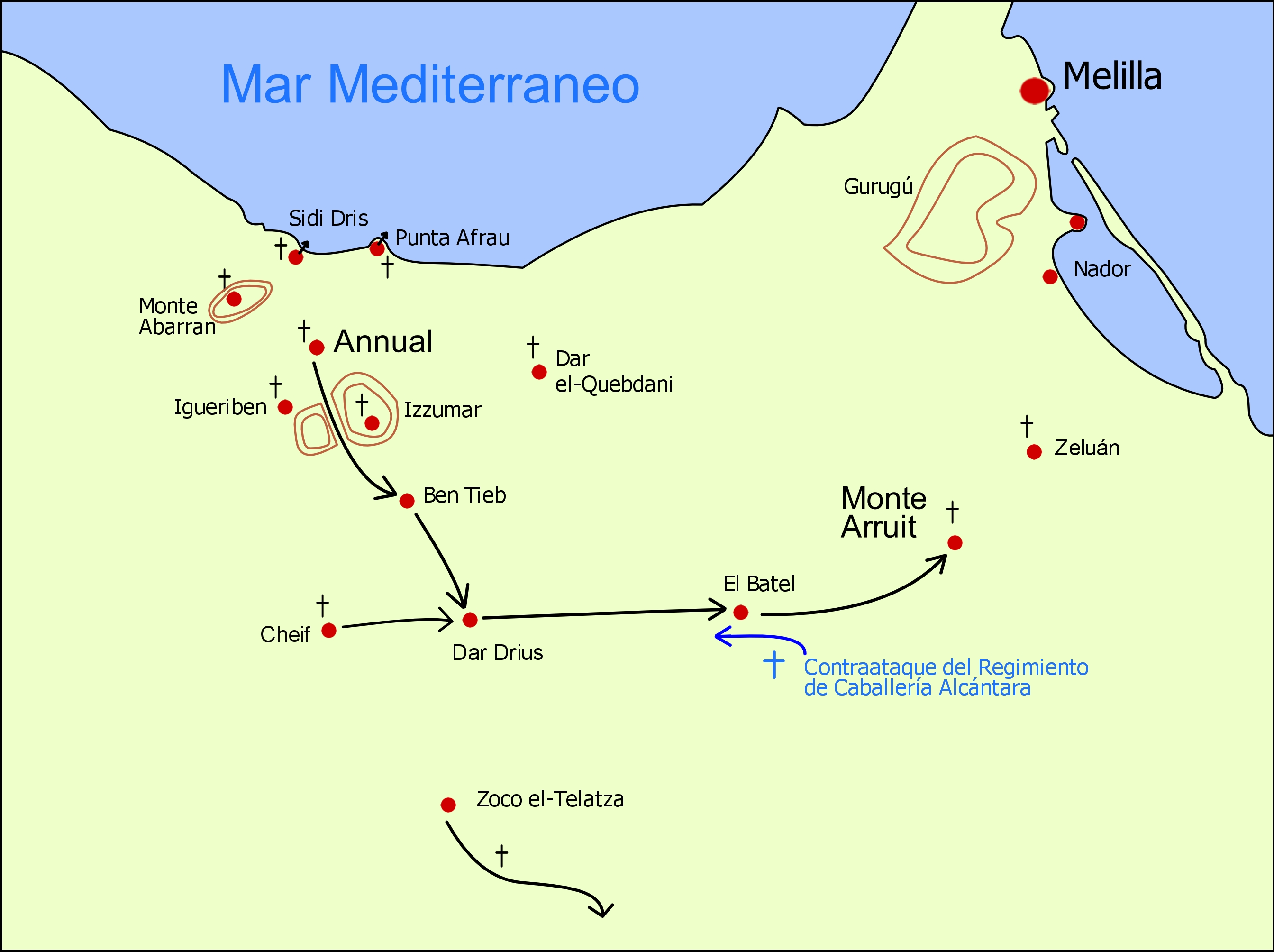 Croquis en el que se representa la retirada de las fuerzas españolas durante el desastre de Annual.